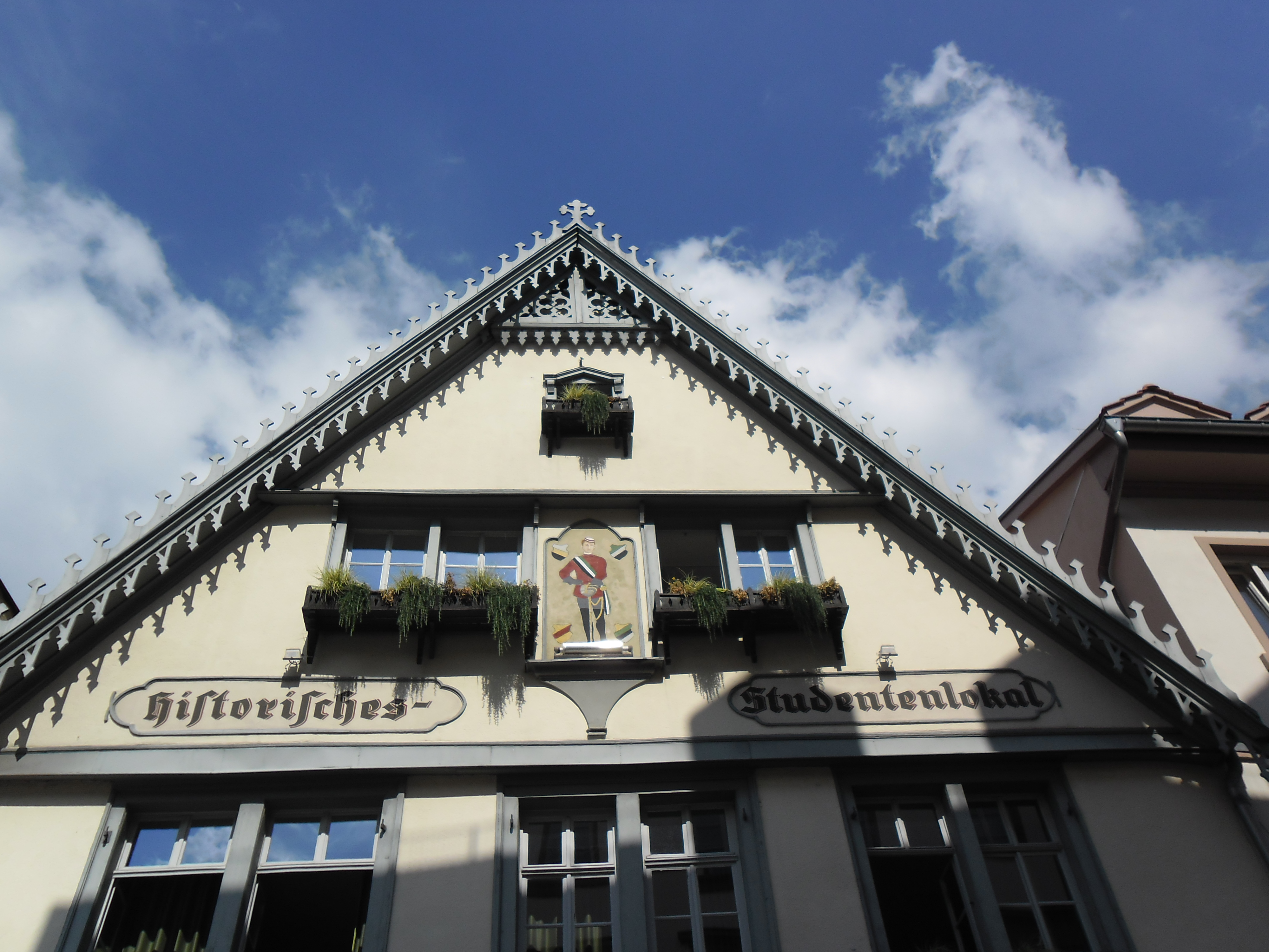 Particolare della facciata di uno storico locale per studenti della città universitaria di Heidelberg. Ho scattato la foto nel corso di un mio viaggio attraverso il Sud e l'Ovest della Germania nel Settembre 2012.